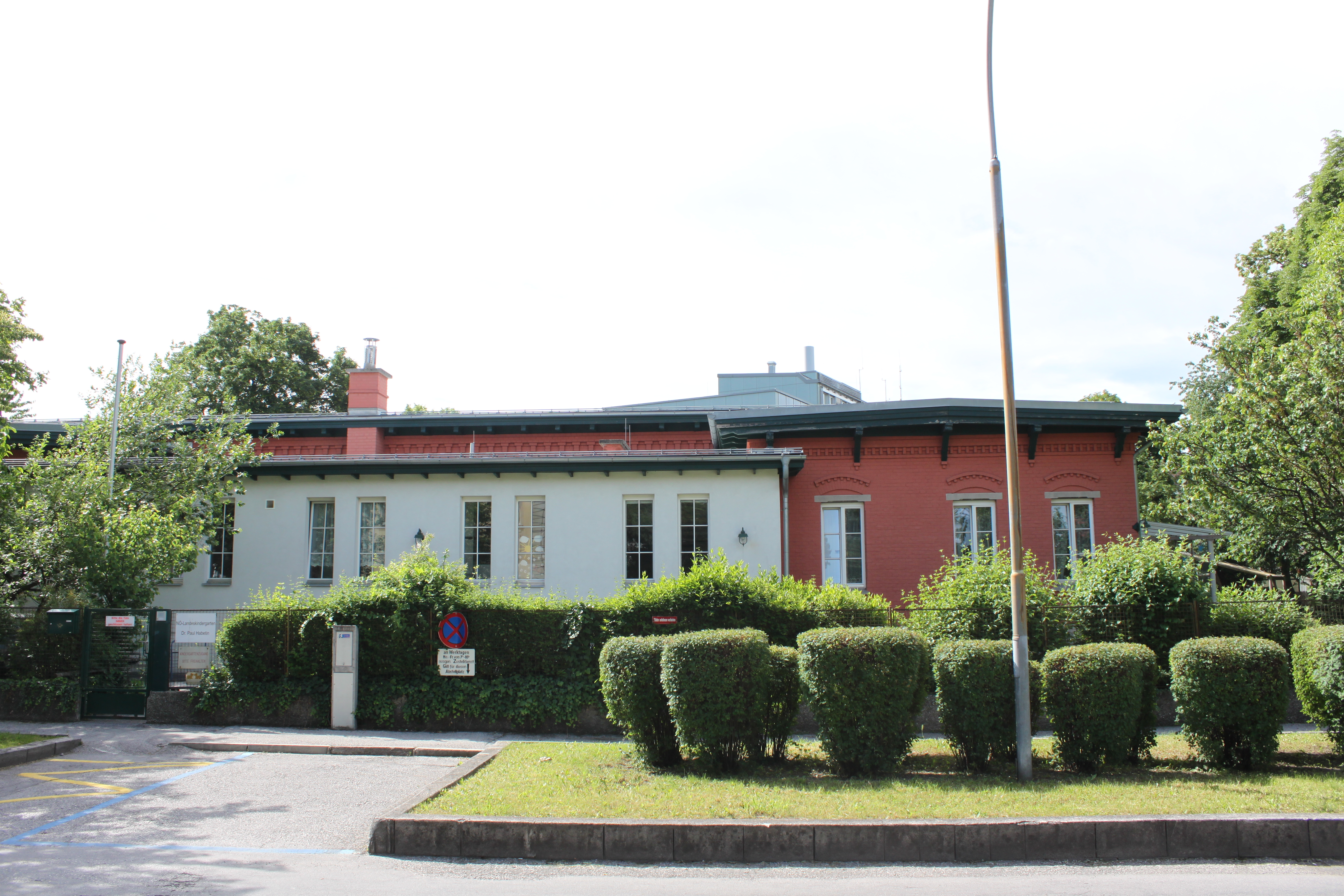 Dr.-Paul-Habetin-Kindergarten, Am Kanal 6, ehemaliger Infektionspavillon und historischer Restbestand vom ehemaligen Truppenspital (Wiener Neustadt) vom Architekt Franz von Gruber (1902-1903)